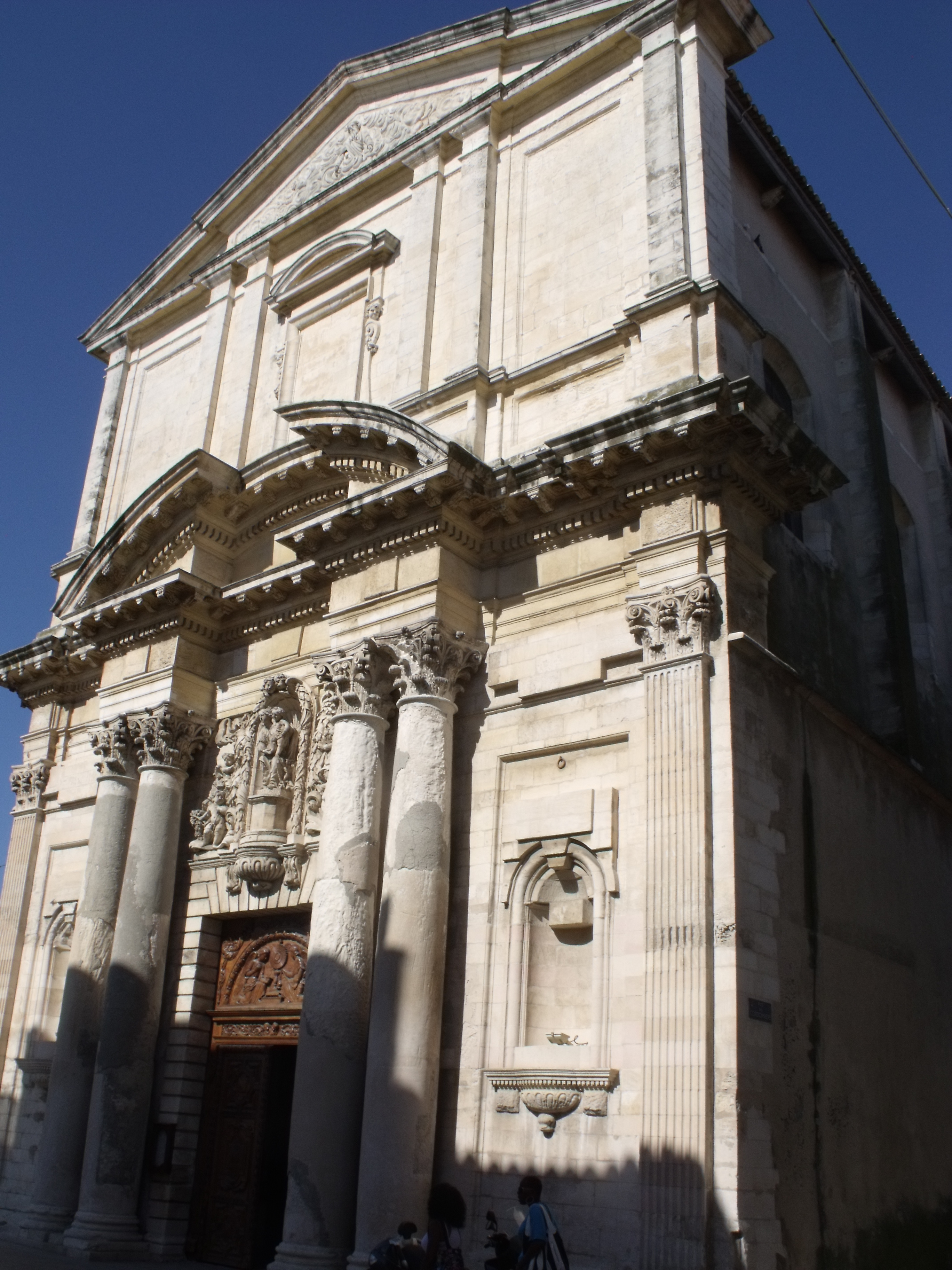 Église Sainte-Madeleine, Martigues